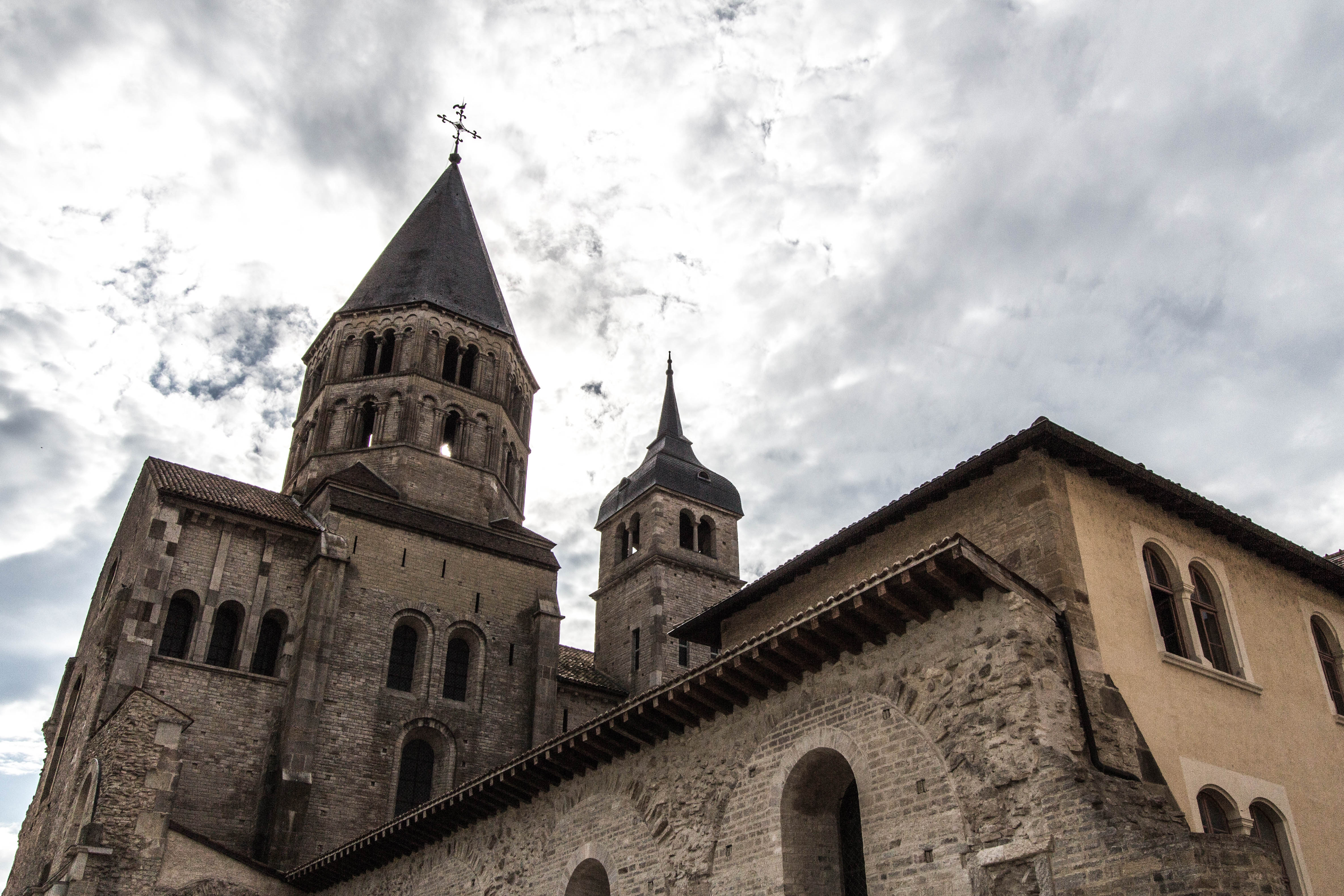 Abbaye